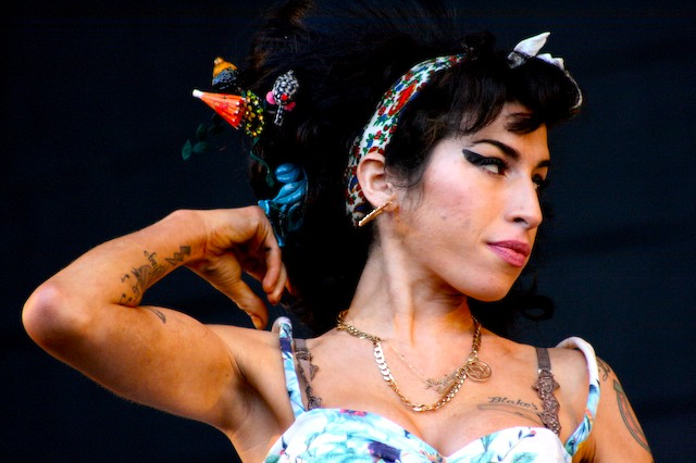 Amy Winehouse retratada en xuulo de 2008